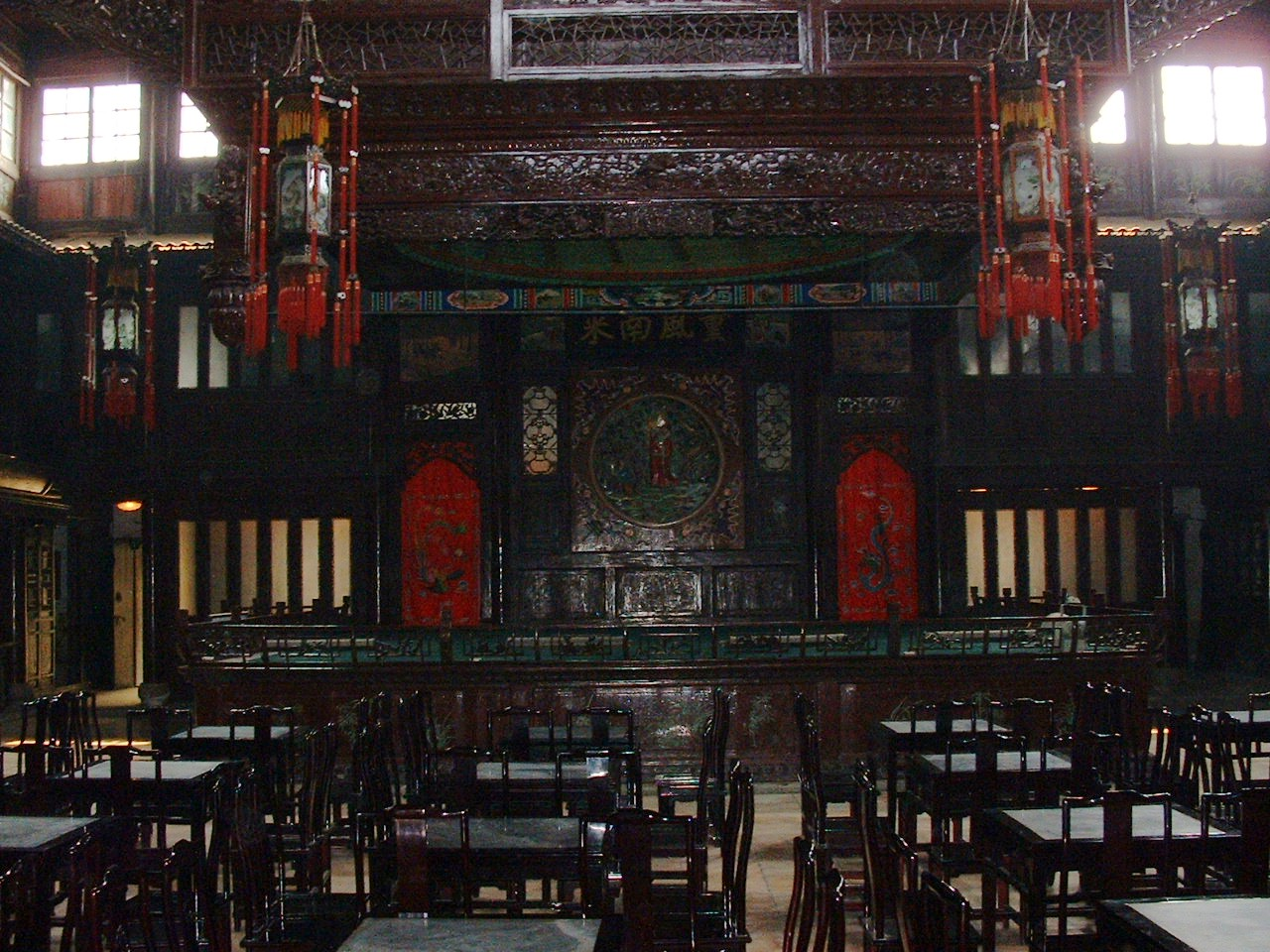 天津广东会馆的图片